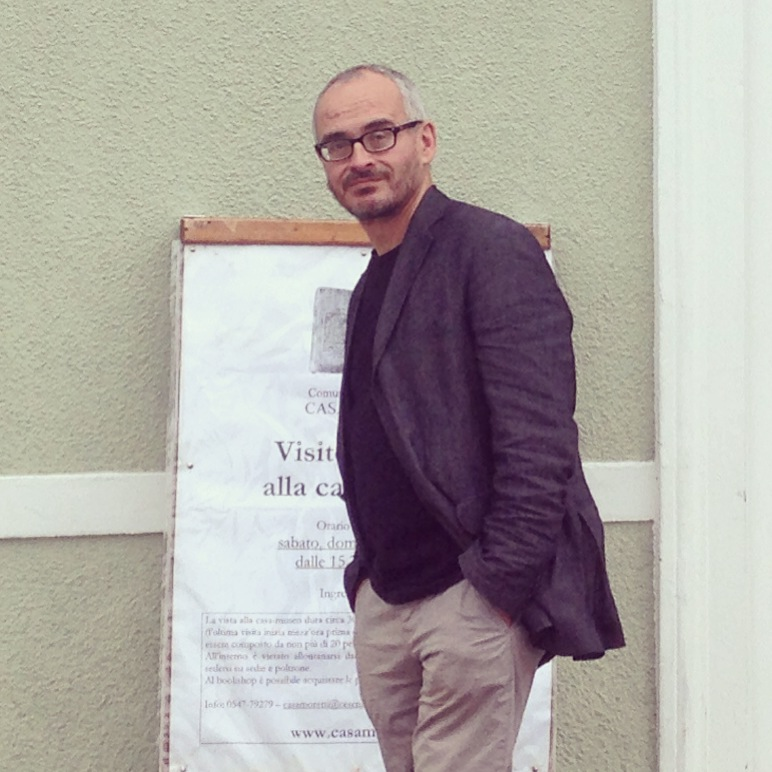 Foto di Rocco Ronchi scatta nel 2014